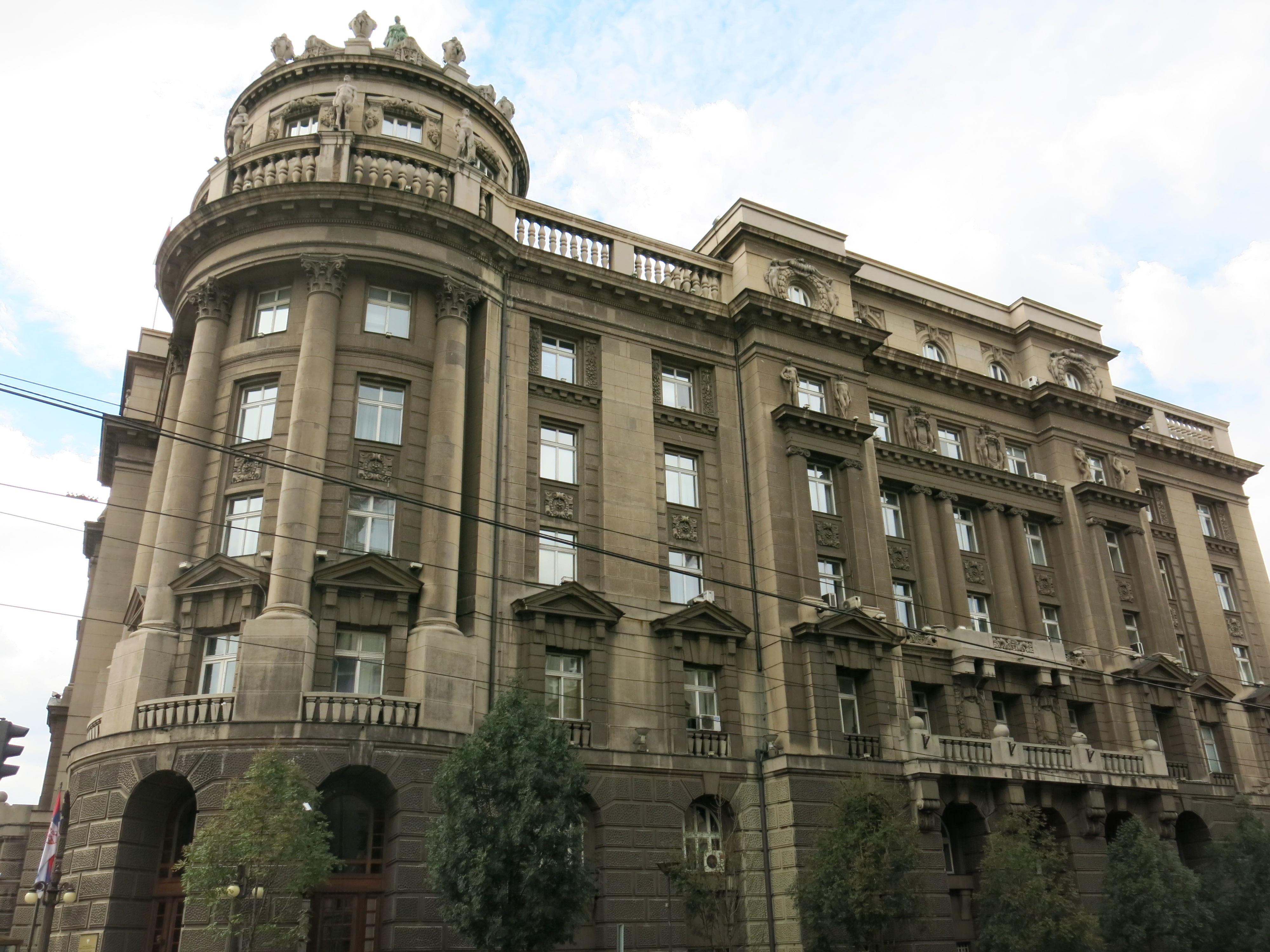 Палата Министарства шума и руда и Министарства пољопривреде и вода